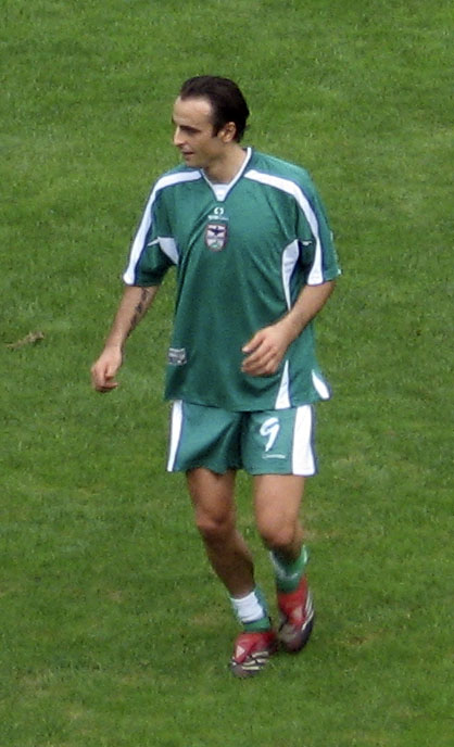 Dimitar Berbatov bei Pirin Blagoevgrad . © 2007 Konstantin Temelkov (